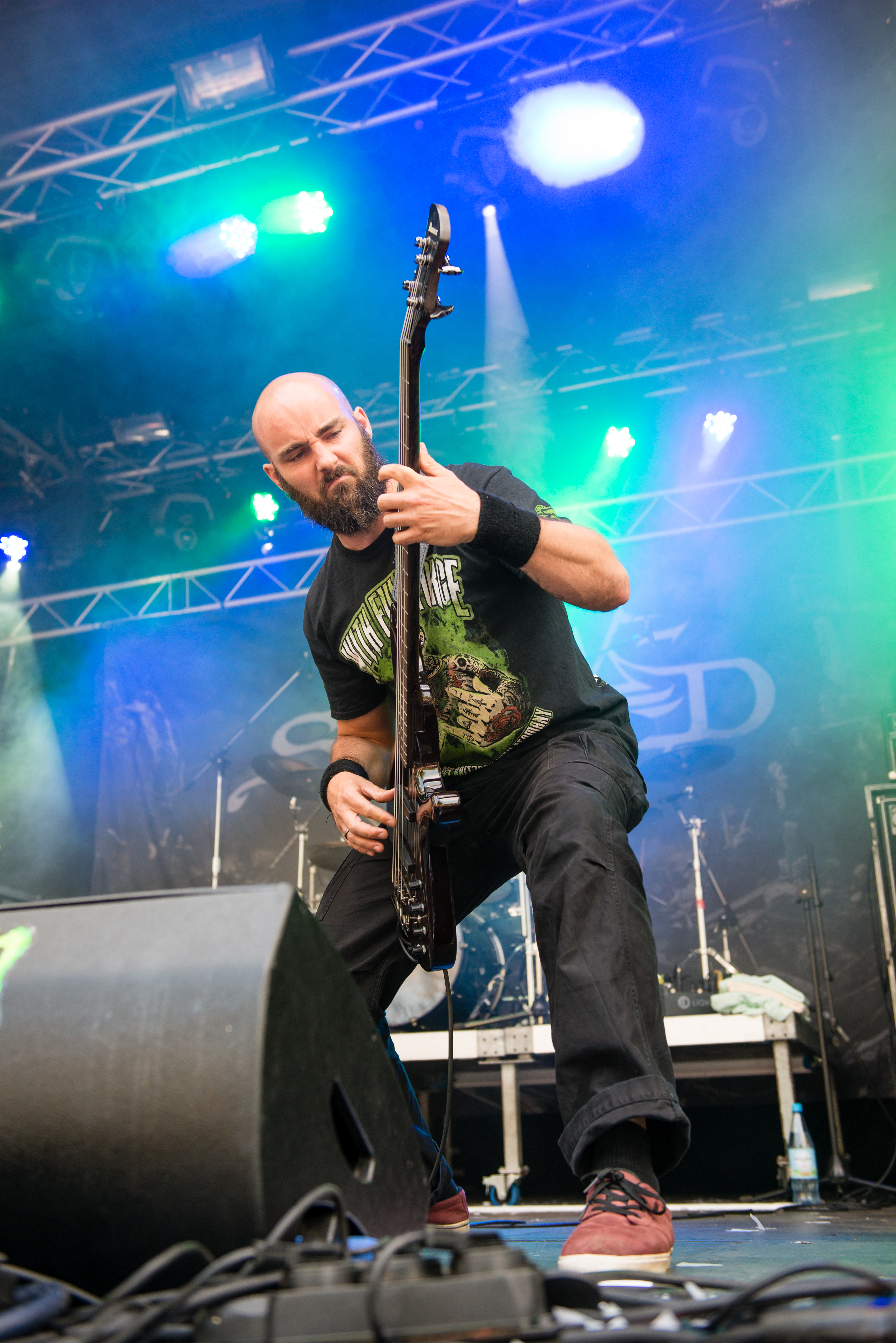 'Nord Open Air 2014 - Essen': 'Dew-Scented'